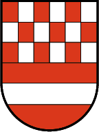 Hohenweiler, Vorarlberg: Ein geteilter Schild. Die obere Hälfte ist in drei Reihen zu je sechs Plätzen von Rot und Silber geschacht; das untere rote Feld wird von einem silbernen Balken durchzogen. Den Schild umgibt eine ornamentierte bronzefarbige Randeinfassung. (Verleihung: 10. April 1929)